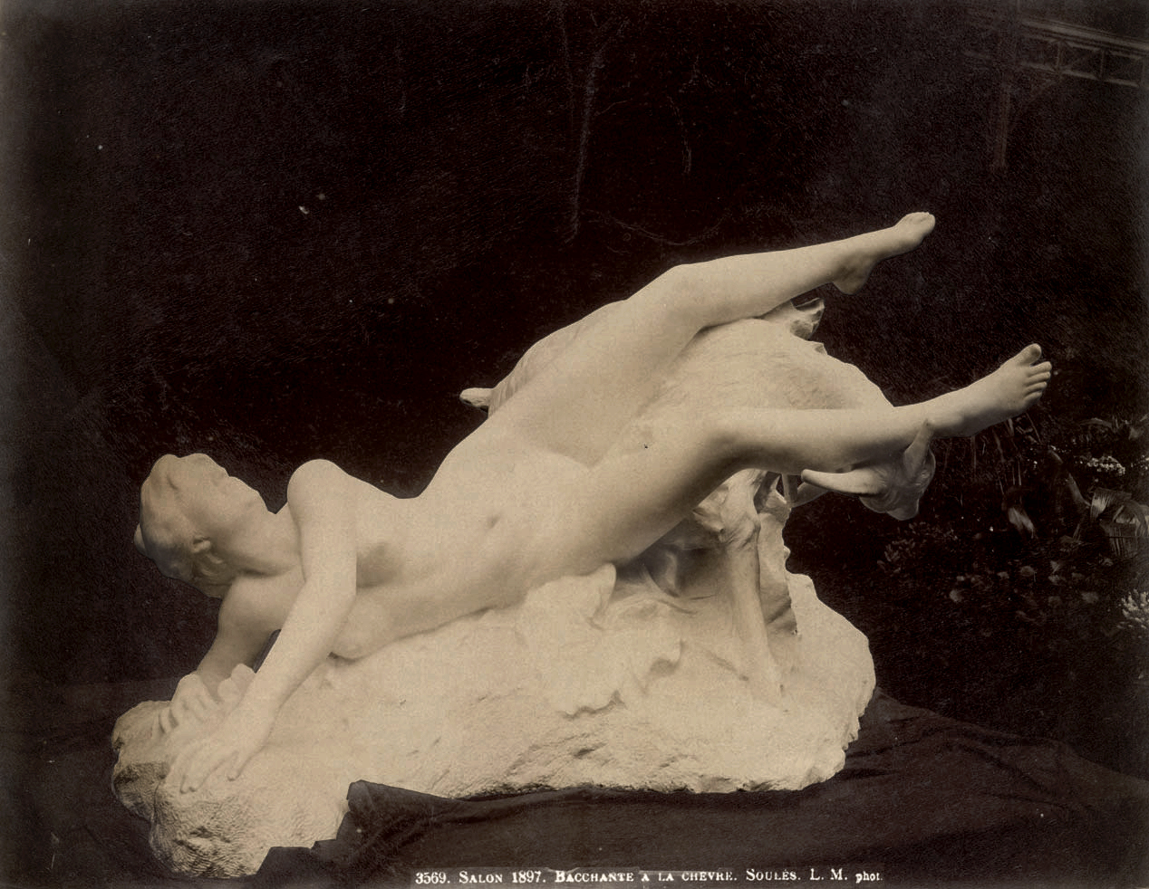 Félix Soulès (1857-1904), Bacchante à la chèvre, Salon de 1897, groupe en marbre, musée des Beaux-Arts de Bordeaux. Photographie de Louis Léopold Mercier (1866-avant 1930).